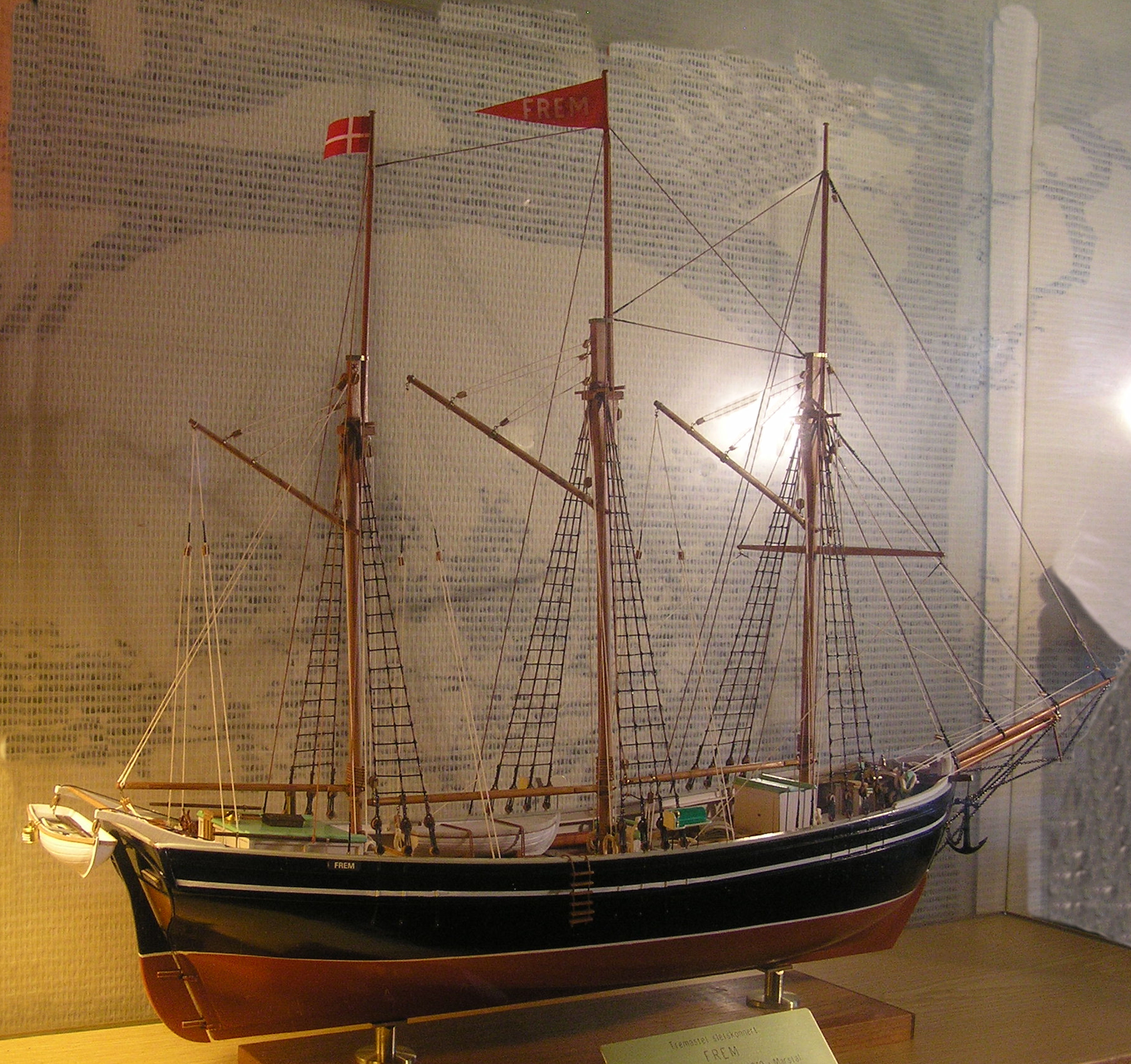 ‘Frem’ 3 master skonnert bygget af maler Ove Andersen, Slagelse i 1979 Solgt til reklametegner Mogens Juul Jørgensen, Slagelse. Medlem af Marineforeningen i Slagelse. Modellen er lavet efter 3 master sletskonnerten FREM, som var ejet af Mogens Juul Jørgensens familie. Skonnerten, der var bygget i Marstal i 1919, var på 138 BRT og blev ført af kaptajn Svend Jørgensen (familiemedlem).